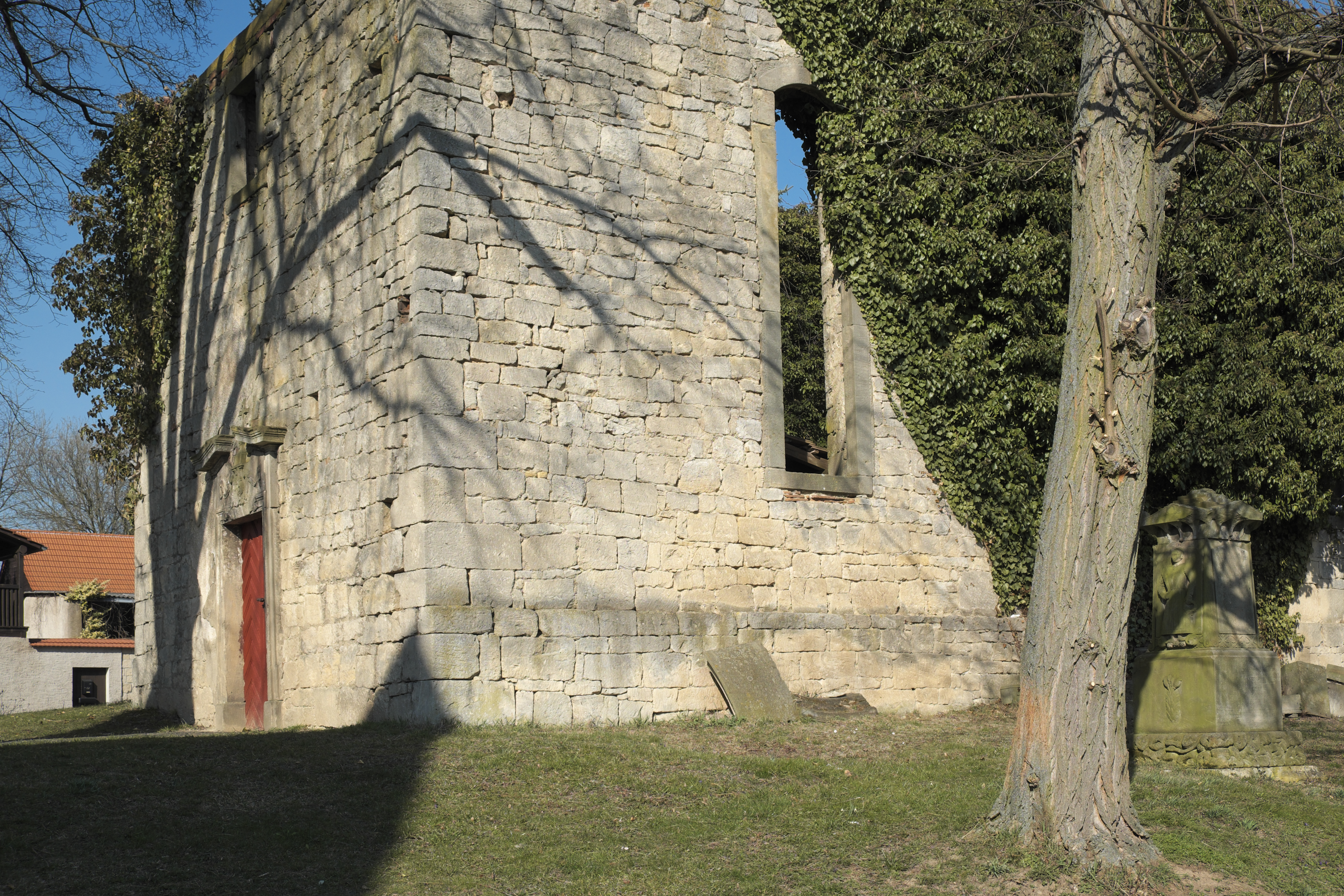 Kirchenruine in Dietrichsroda, einem Ortsteil von Balgstädt im Burgenlandkreis in Sachsen-Anhalt/Deutschland